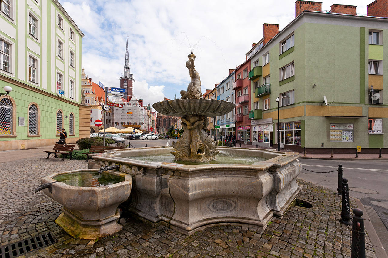 Fontanna Trytona w Nysie